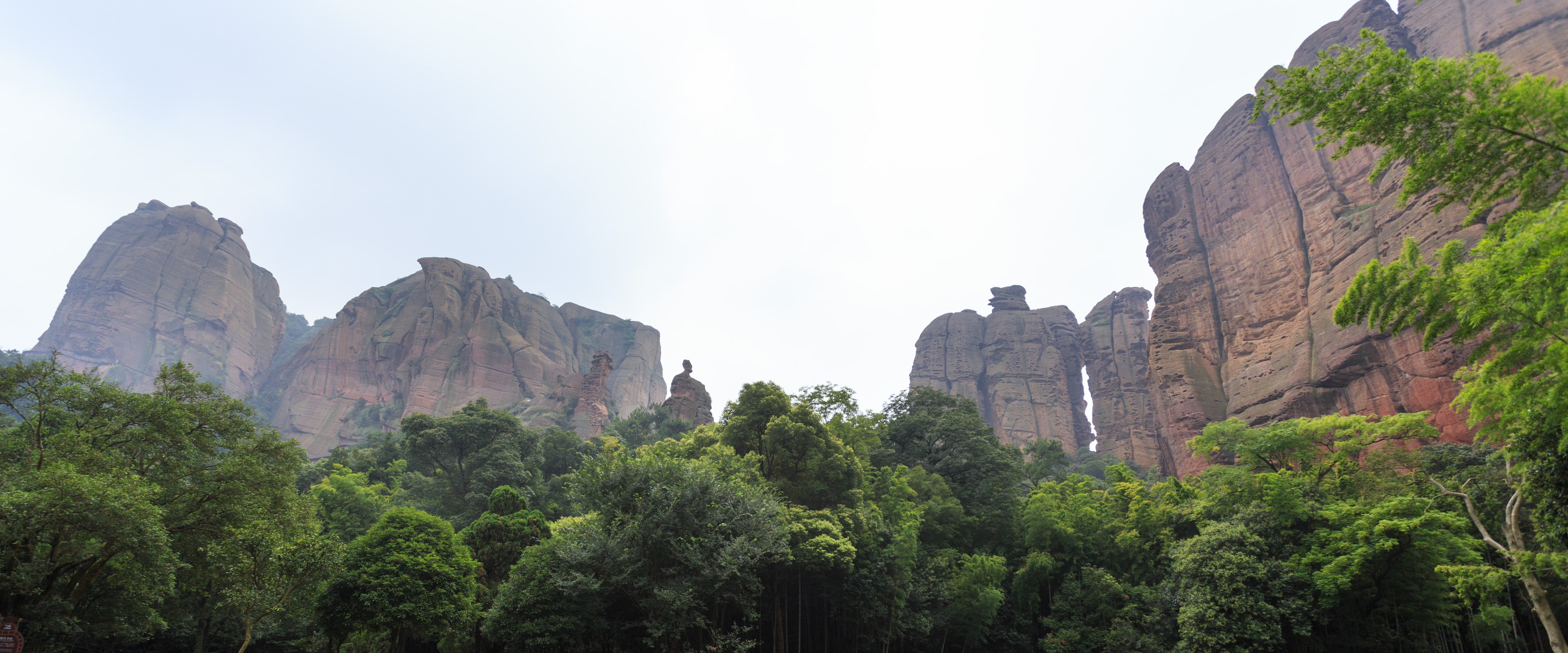 龟峰